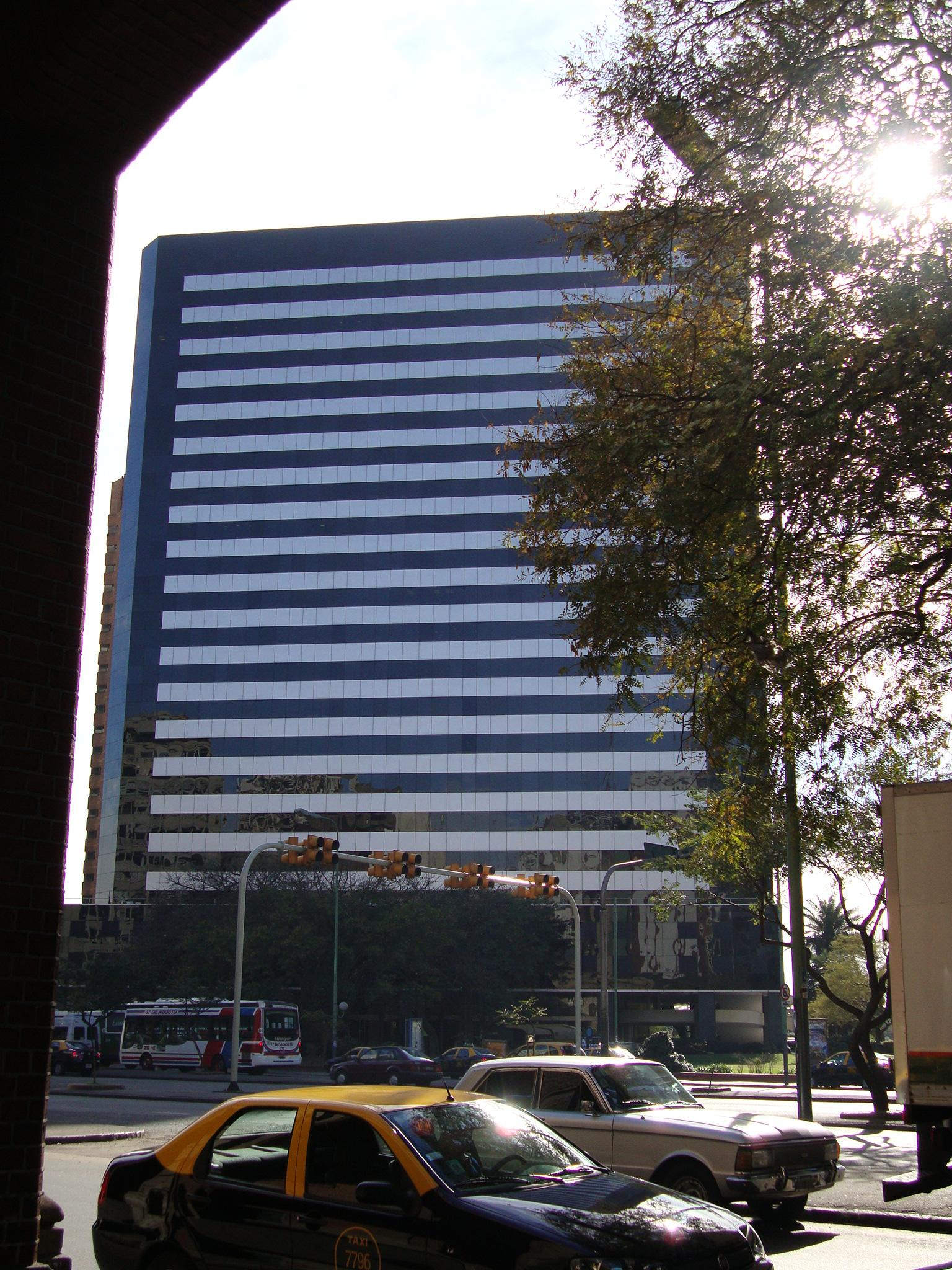 El edificio Laminar Plaza (1999), parte del conjunto Catalinas Norte. Proyecto de Peralta Ramos (SE.PR.A). Visto desde la recova de la Avenida Leandro N. Alem. Retiro, ciudad de Buenos Aires, Argentina.